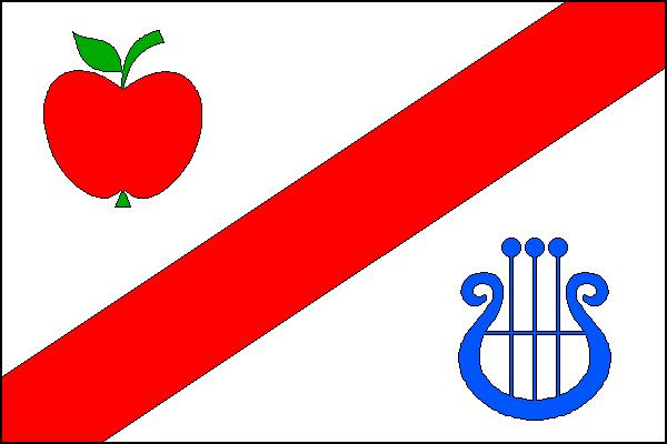 Vlajka obce Jabkenice